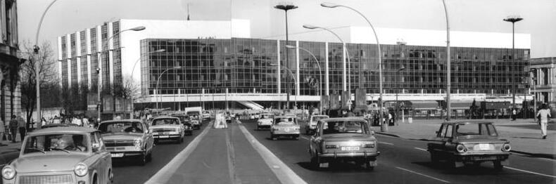 ADN-ZB-Kohls-21-4-76 Berlin: Palast der Republik Ansicht des Palastes von der Straße Unter den Linden. (2teiliges Panorama)